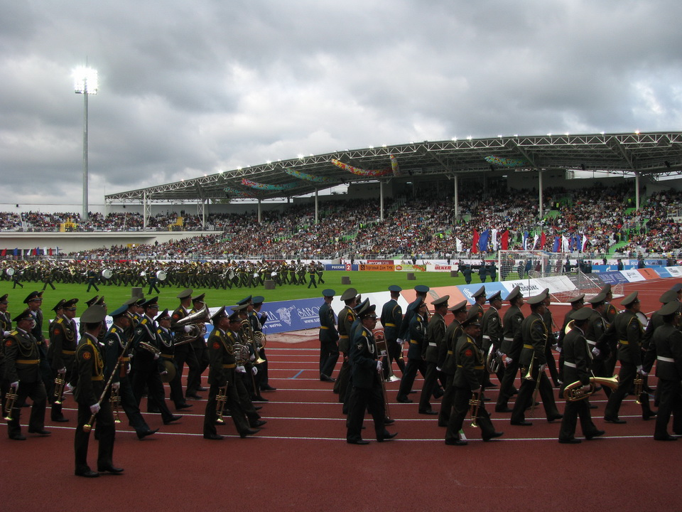 Открытие Центрального стадиона Екатеринбурга после реконструкции. Установление рекорда Гиннесса - оркестр из 700 музыкантов.